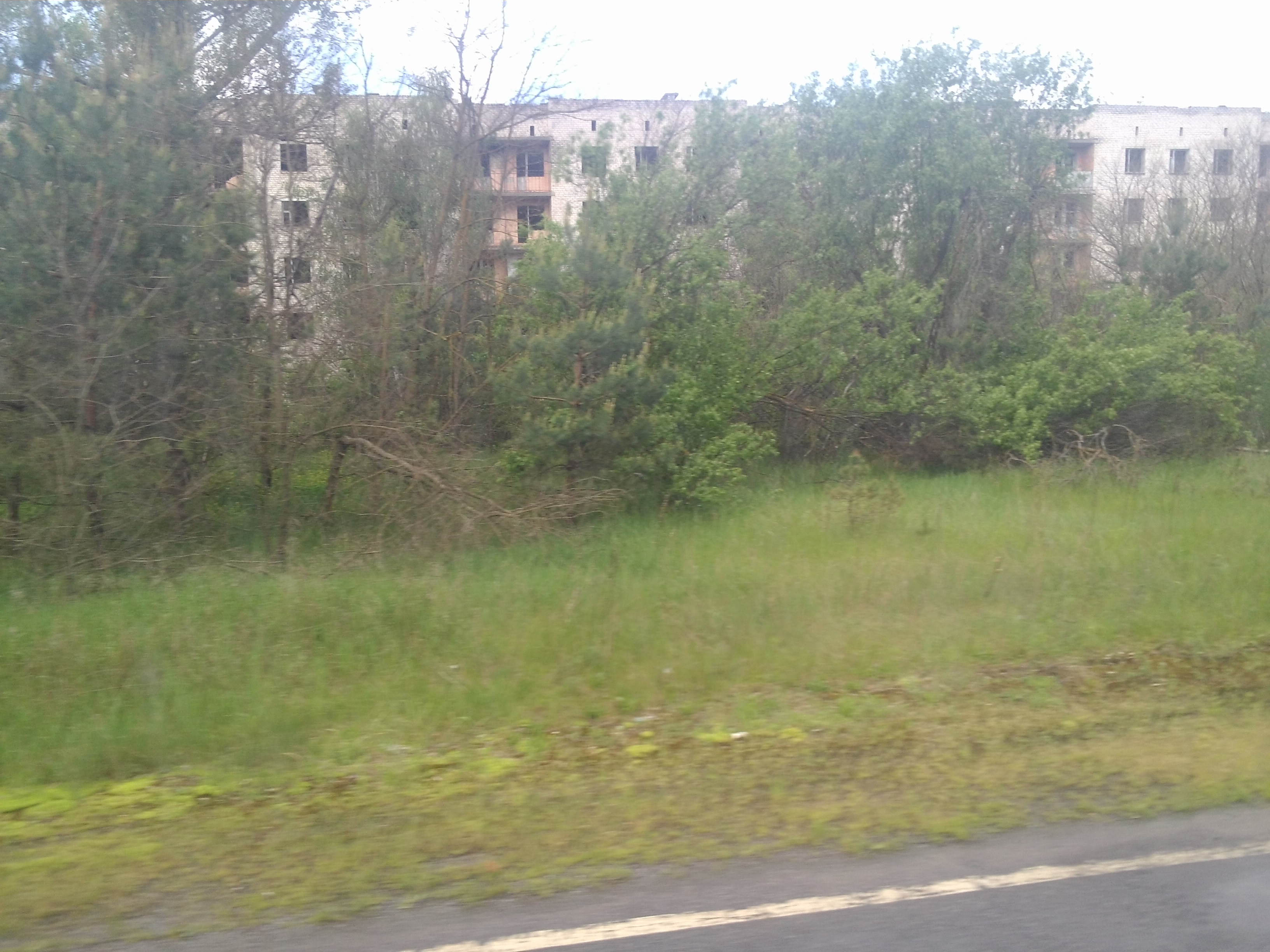 смт Поліське